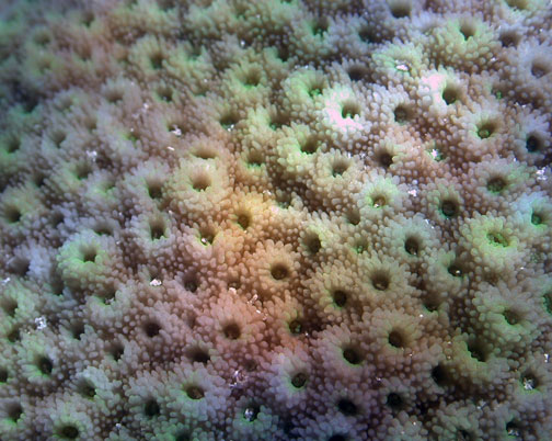 Astreopora myriophthalma, Samoa Americana